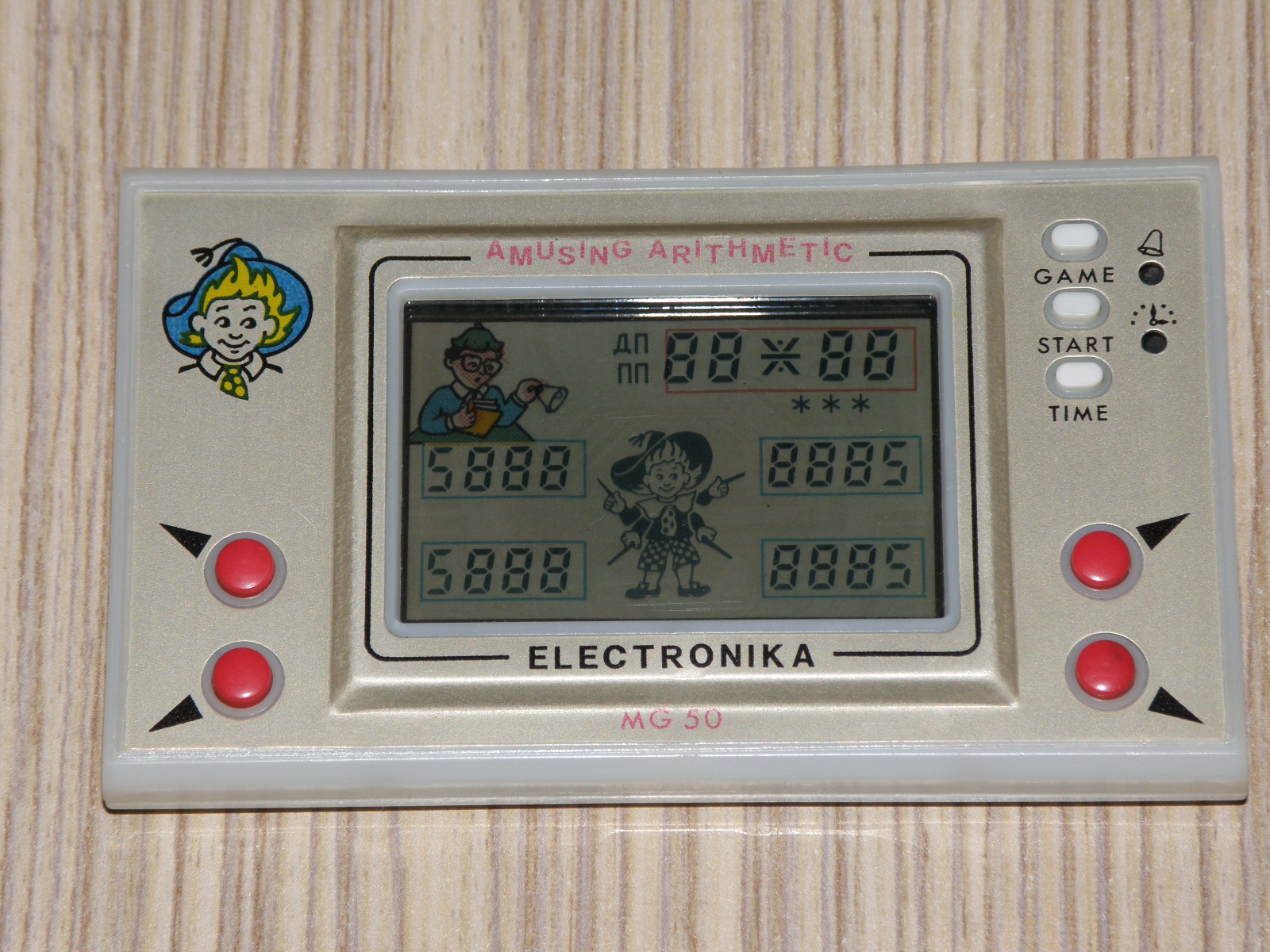 Игра электроника ИМ-50 ВЕСЁЛАЯ АРИФМЕТИКА